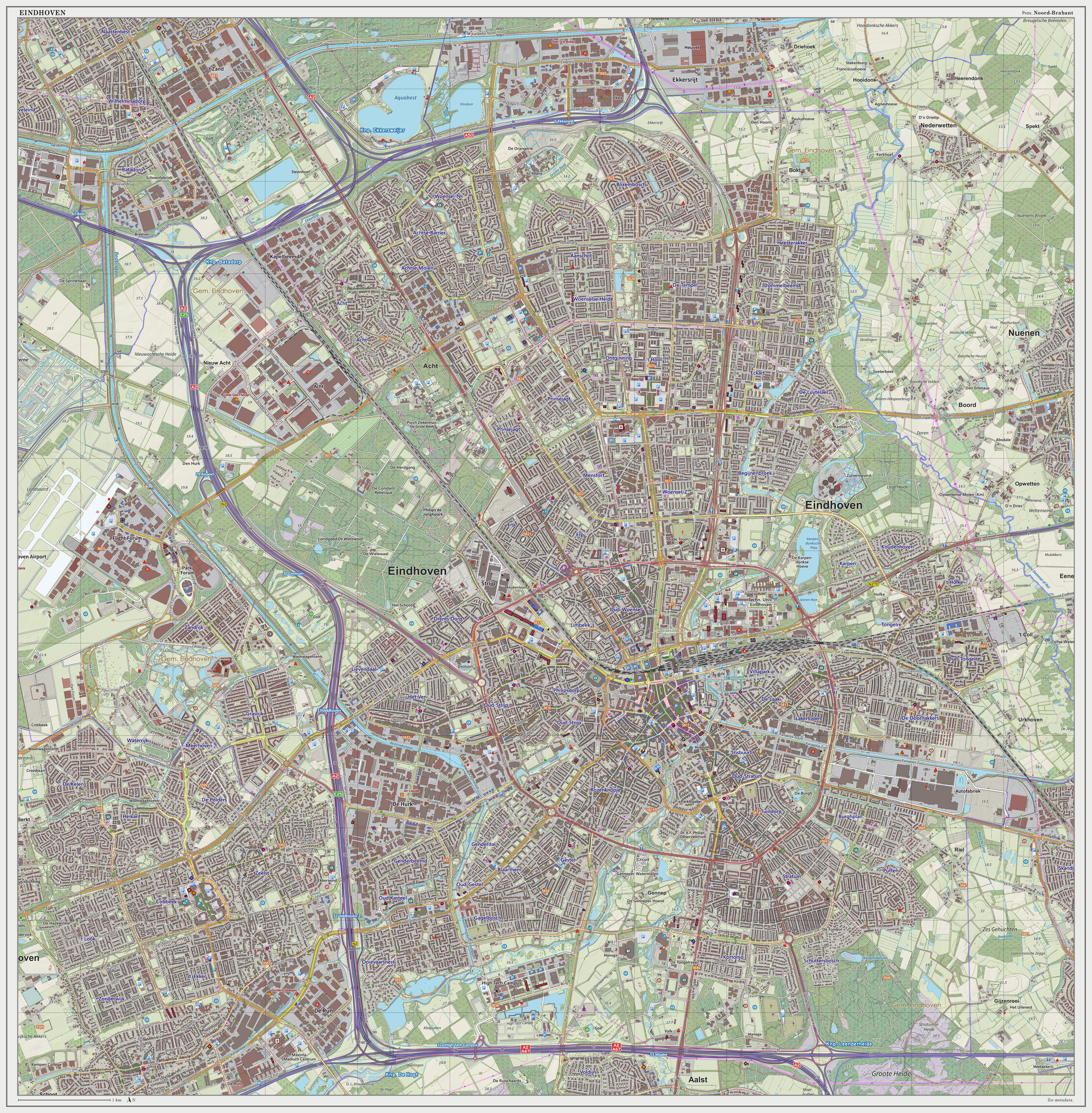 Topografische kaart van Eindhoven (woonplaats). Resolutie: 300 pixels/km. Kaartbeeld samengesteld uit de open geodata van de Top10NL en Top25namen (Basisregistratie Topografie, Kadaster), Creative Commons BY licentie. Gebouwvlakken uit open geodata BAG extract. Wegen uit de OpenStreetMap, OpenStreetMap community. Reliëfschaduw uit de Actuele Hoogtekaart AHN2. Samenstelling en kleurenschema: Jan-Willem van Aalst, met QGIS2. Zie ook de Legenda.